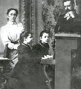 семья пианистки Зограф-Плаксиной, Валентины Юрьевны